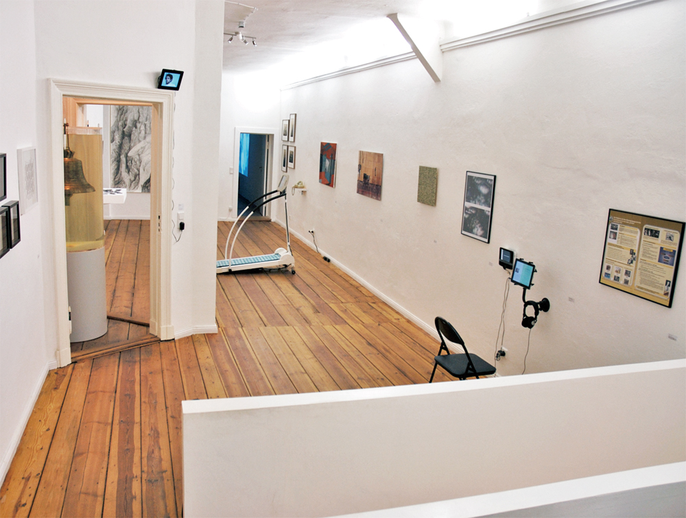 Ausstellungsraum G.A.S-station Berlin